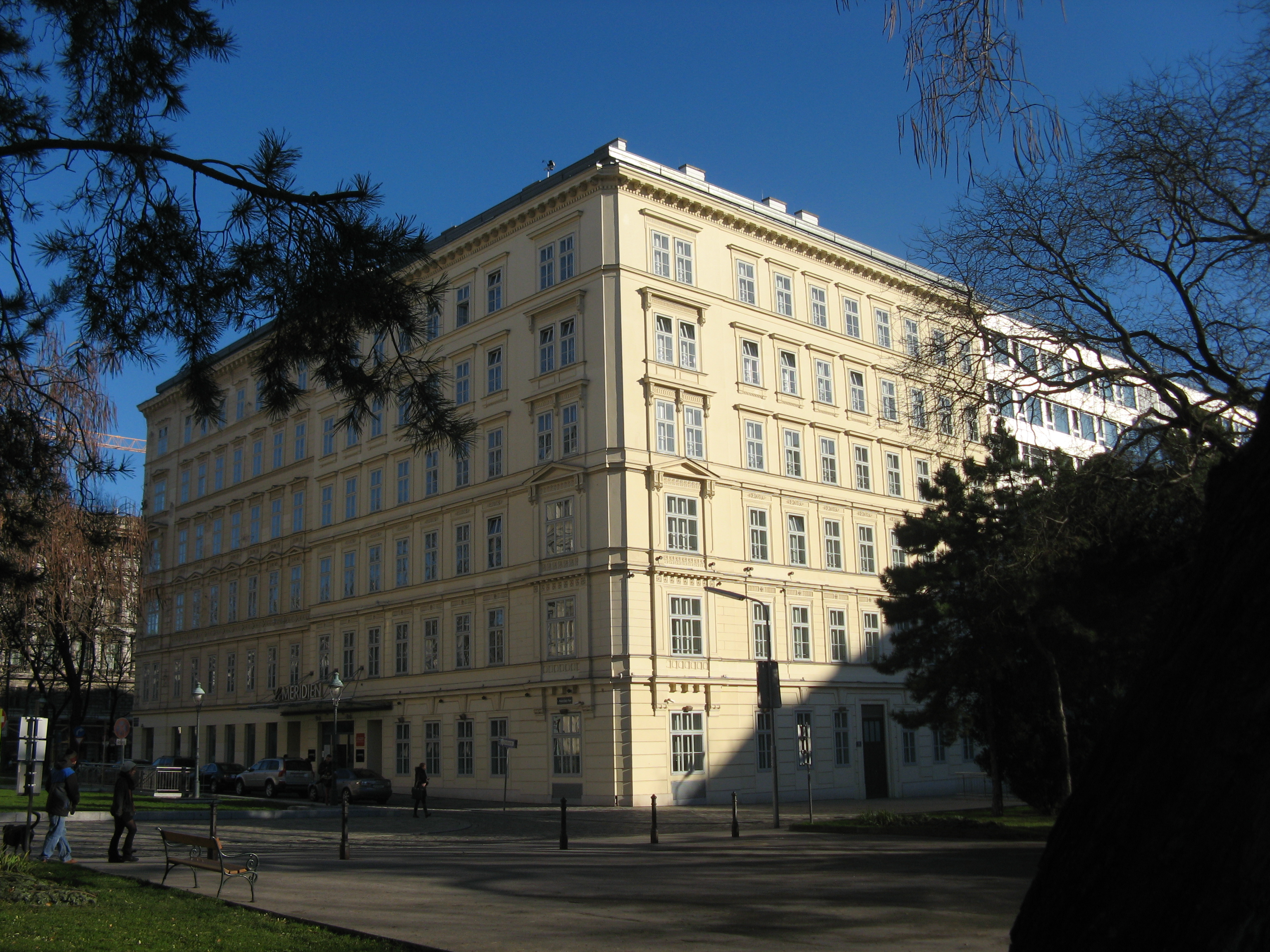 Elisabethstraße 14 (1861) von Johann Friedl, Wien-Innere Stadt